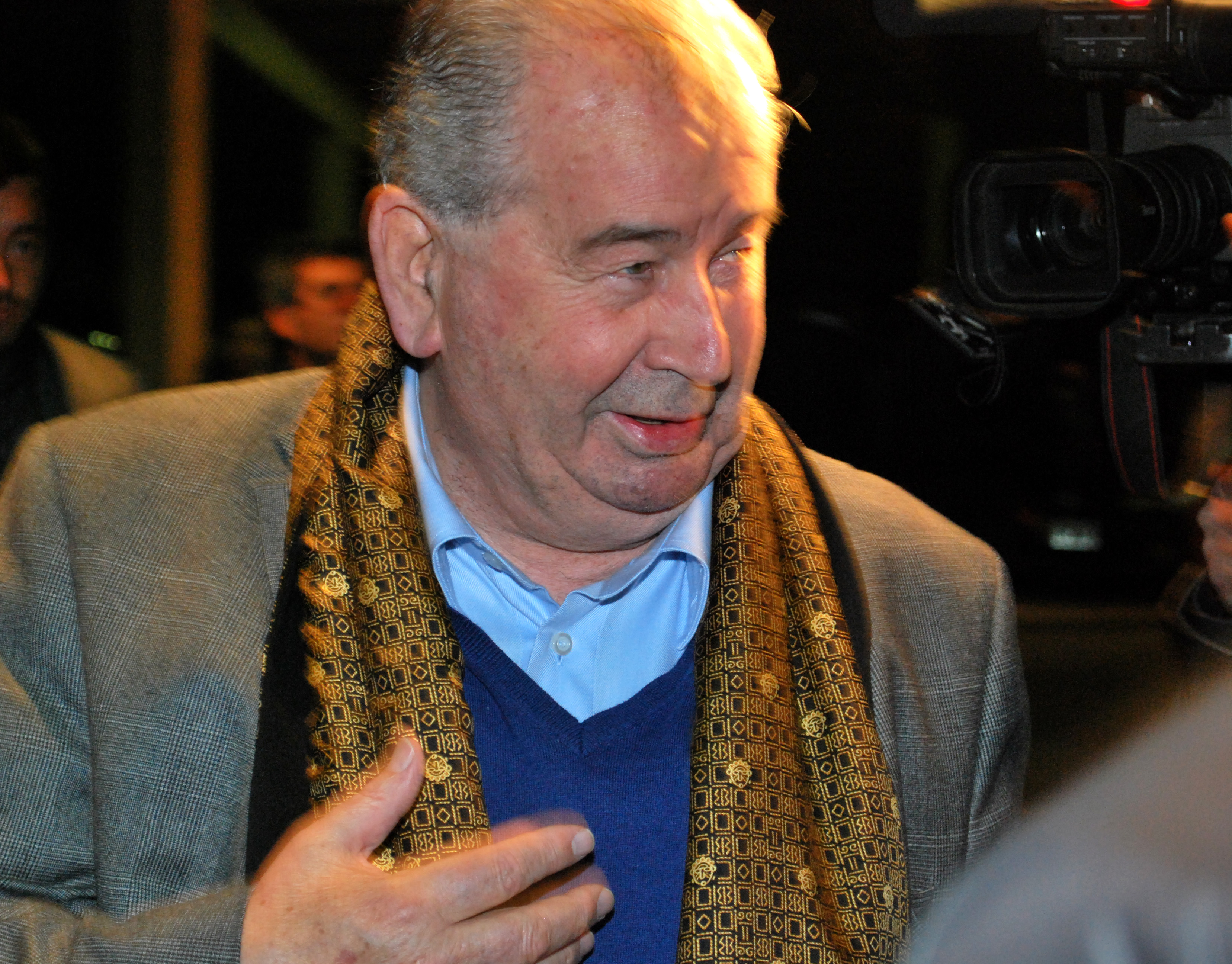 Julio Grondona, dirigente deportivo argentino.